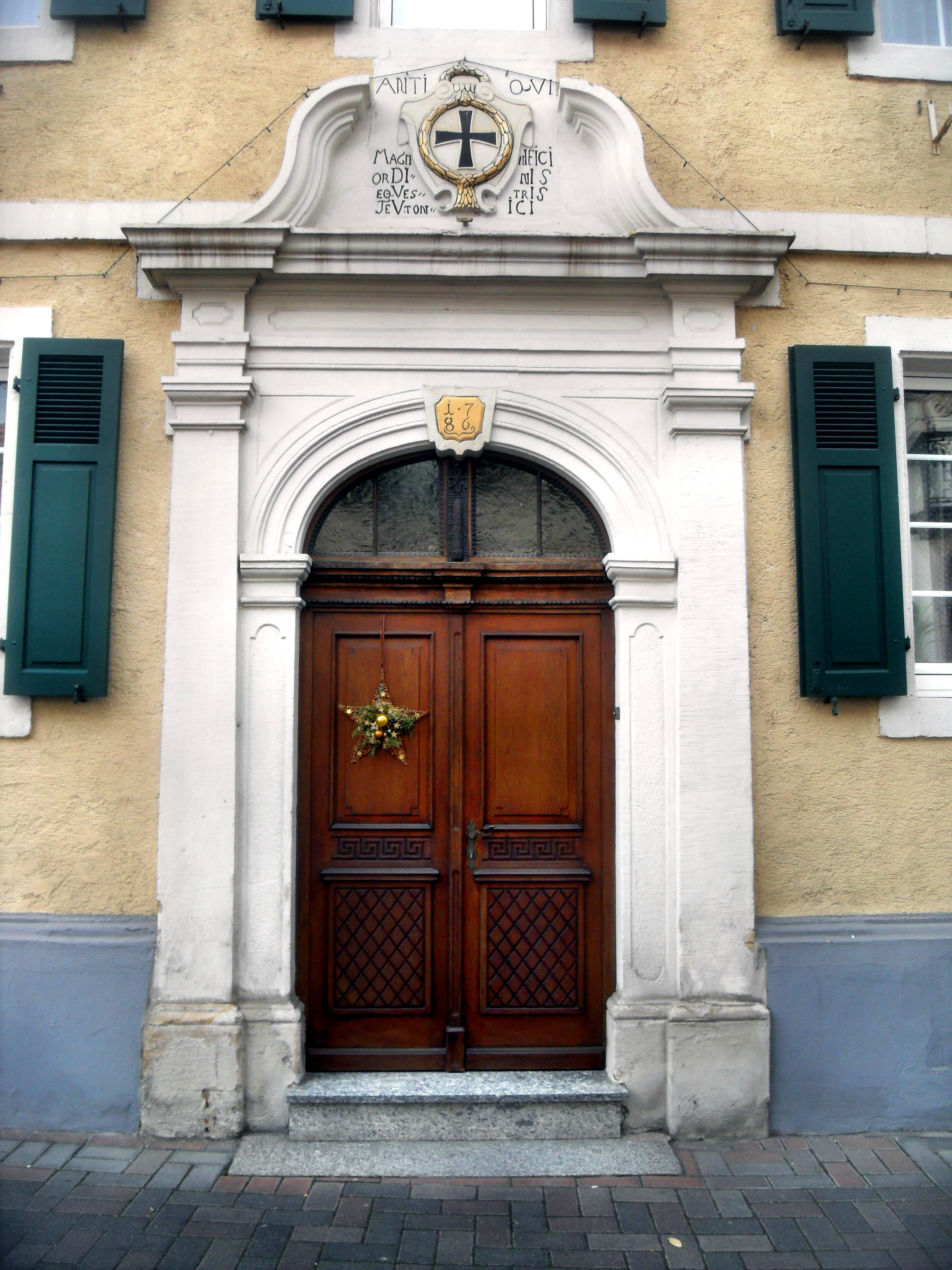 Der Haupteingang des Wohngebäudes auf dem Deutschherrenhof (Weingut Frey) in Guntersblum in Rheinhessen (Deutschland)